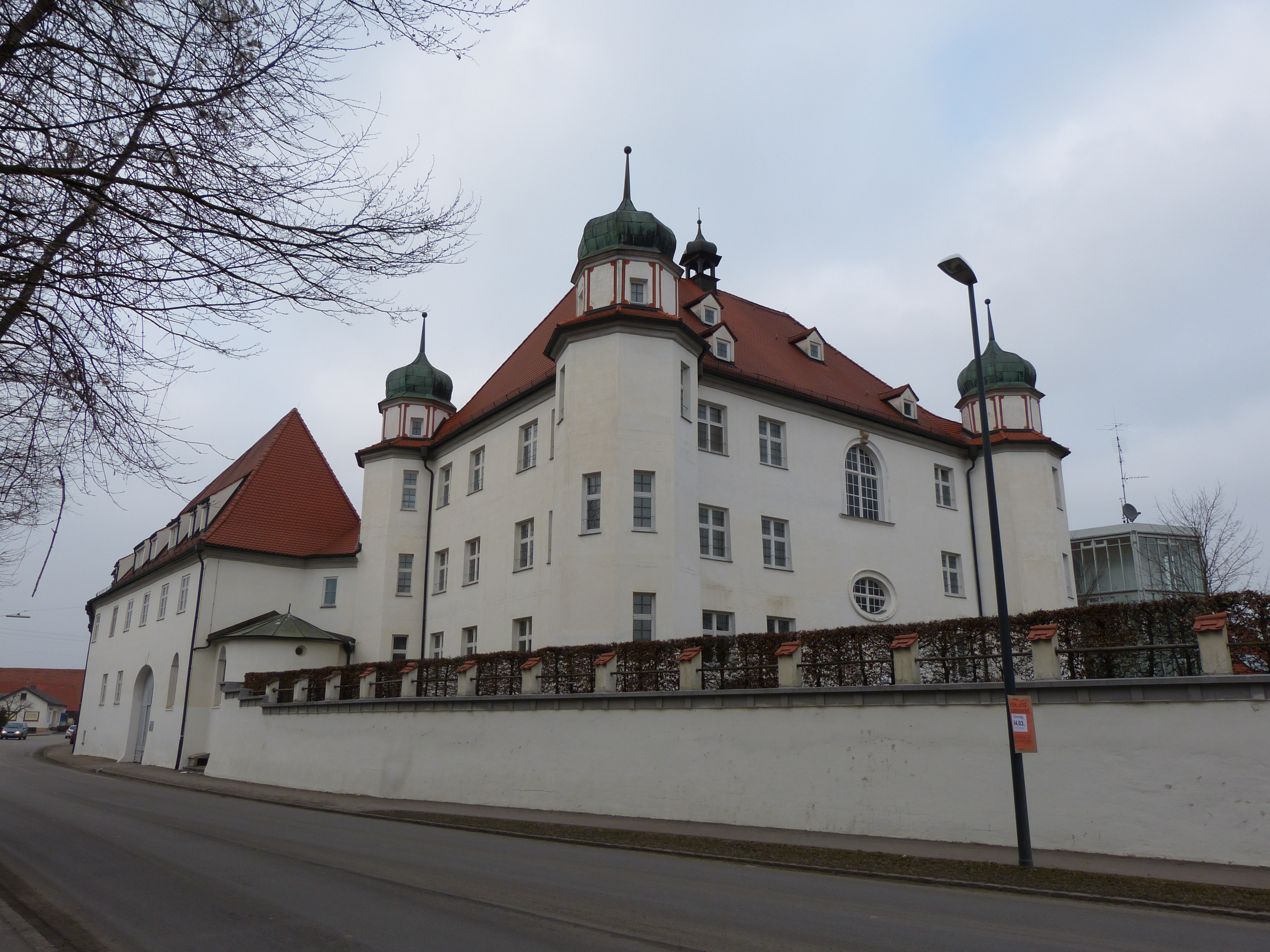 Schloss, Fellheim, Landkreis Unterallgäu, Bayern